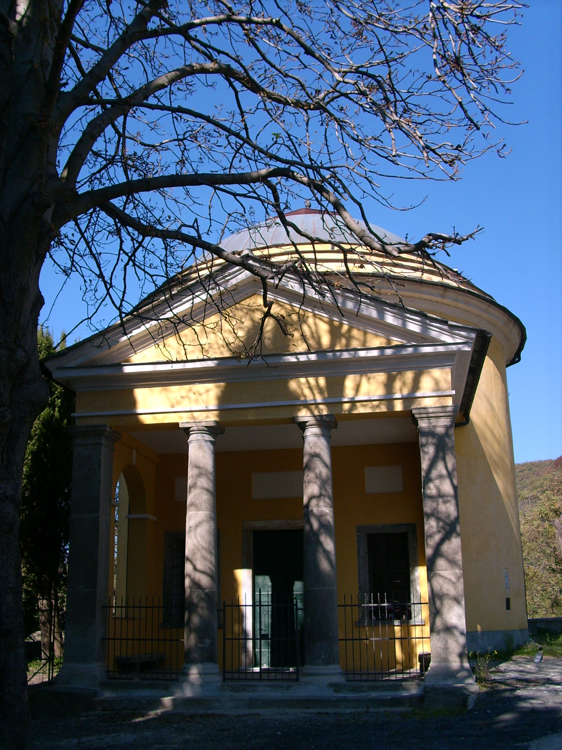 Oratorio di San Rocco presso Stella Santa Giustina, Liguria, Italia